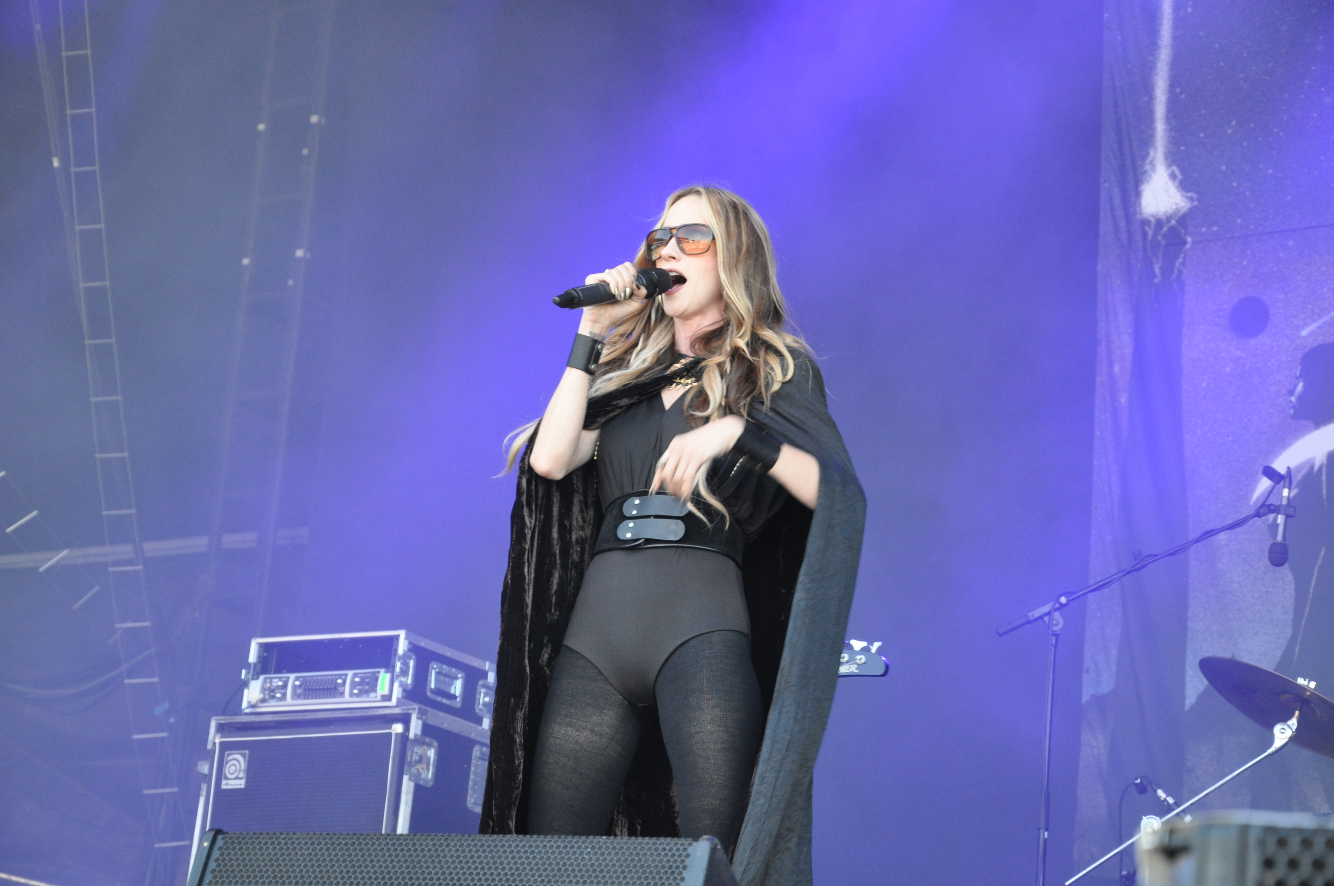 Huntress auf der Clubstage bei Rock am Ring 2014